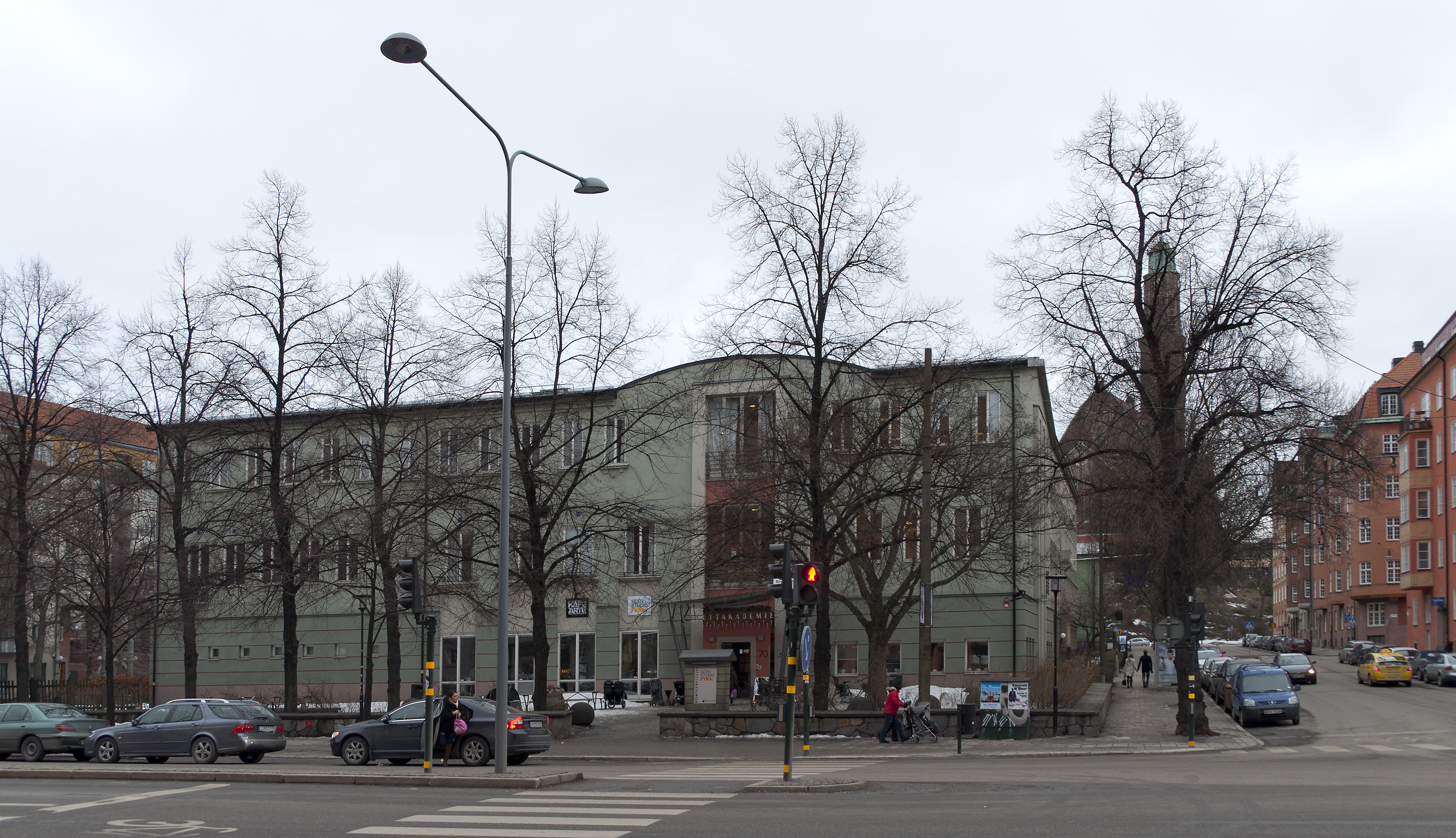 Birger Jarlsgatan 70, Balettakademin, Stockholm. Byggnadsår 1995-96. Arkitekt: A-TRE Arkitekter